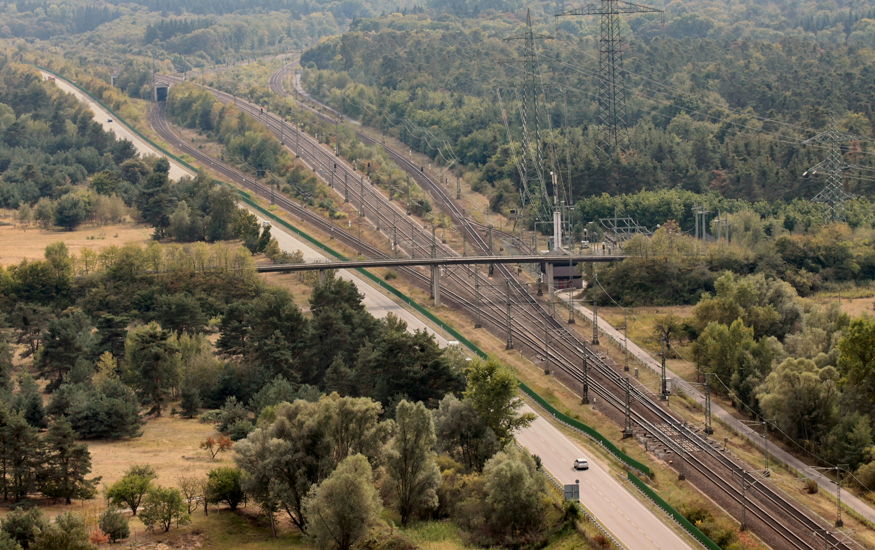 Der Abzweig Saalbach der Schnellfahrstrecke Mannheim–Stuttgart. Im Vordergrund die Bundesstraße 36 von Karlsruhe nach Mannheim, rechts das Unterwerk Wiesental mit einer Sendeanlage für GSM und GSM-R